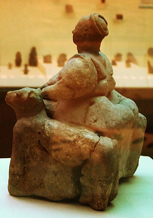 Bogini Matka z Çatalhöyük (Turcja), neolit (ok. 5500-6000 pne.), obecnie w Muzeum Cywilizacji Anatolijskich w Ankarze; Mother Goddes from Çatalhöyük (Turkey), neolithic age (about 5500-6000 BC), today in Museum of Anatolian Civilizations in Ankara